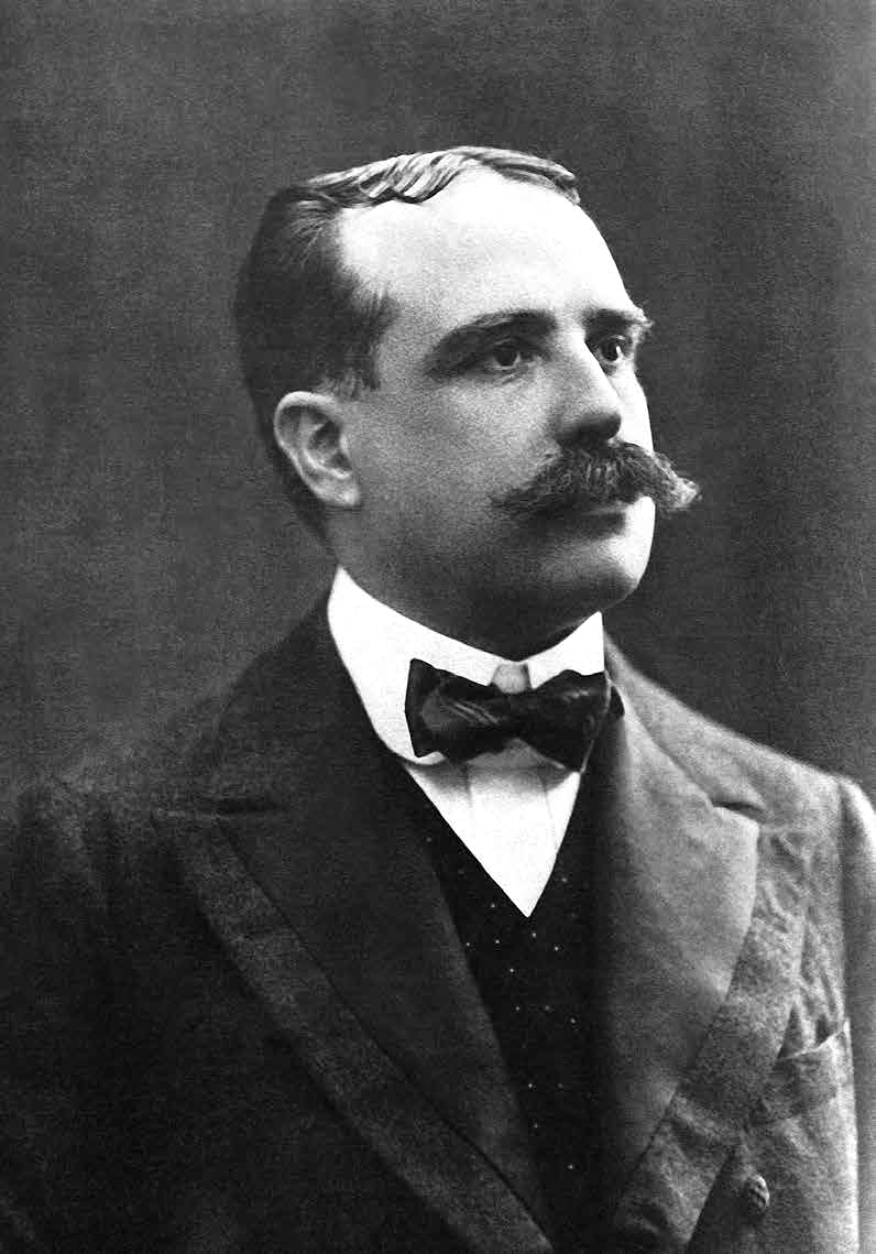 José Pardo y Barreda, como presidente del Consejo de Ministros y titular de Relaciones Exteriores (1903-1904).